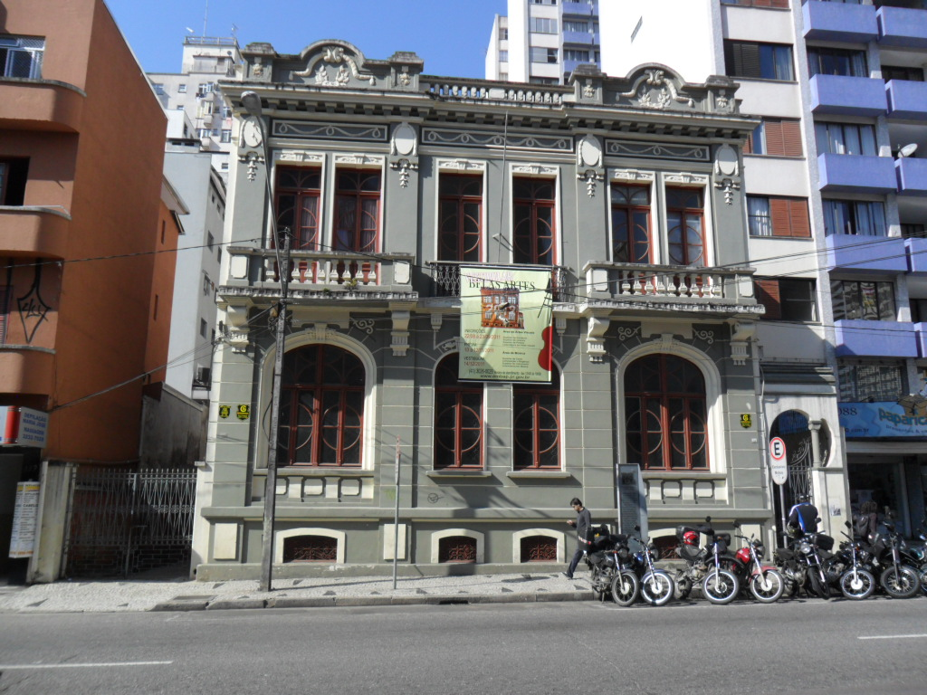 Antigo prédio da EMBAP, 2011